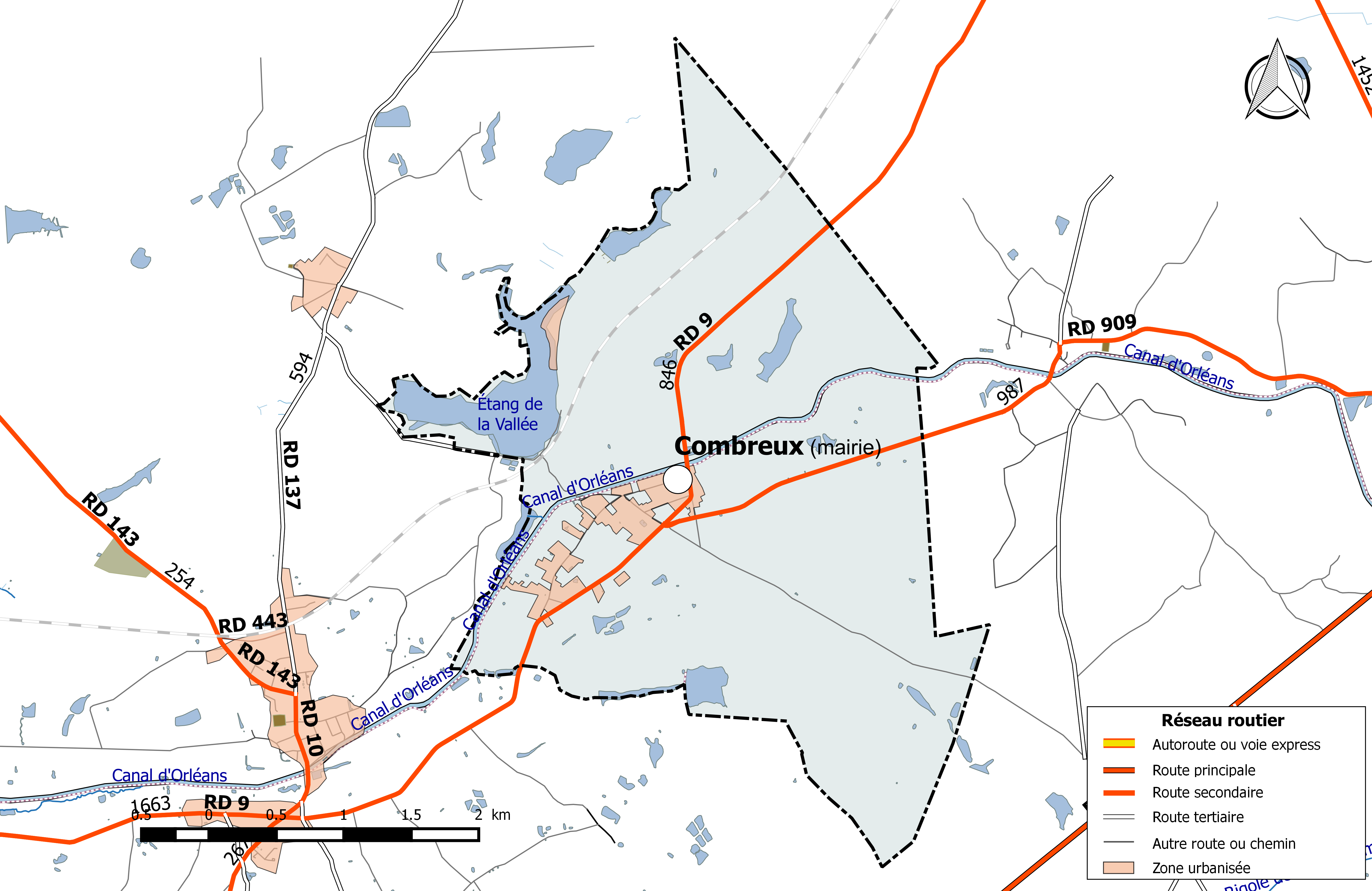 Carte du réseau routier de la commune de Combreux.